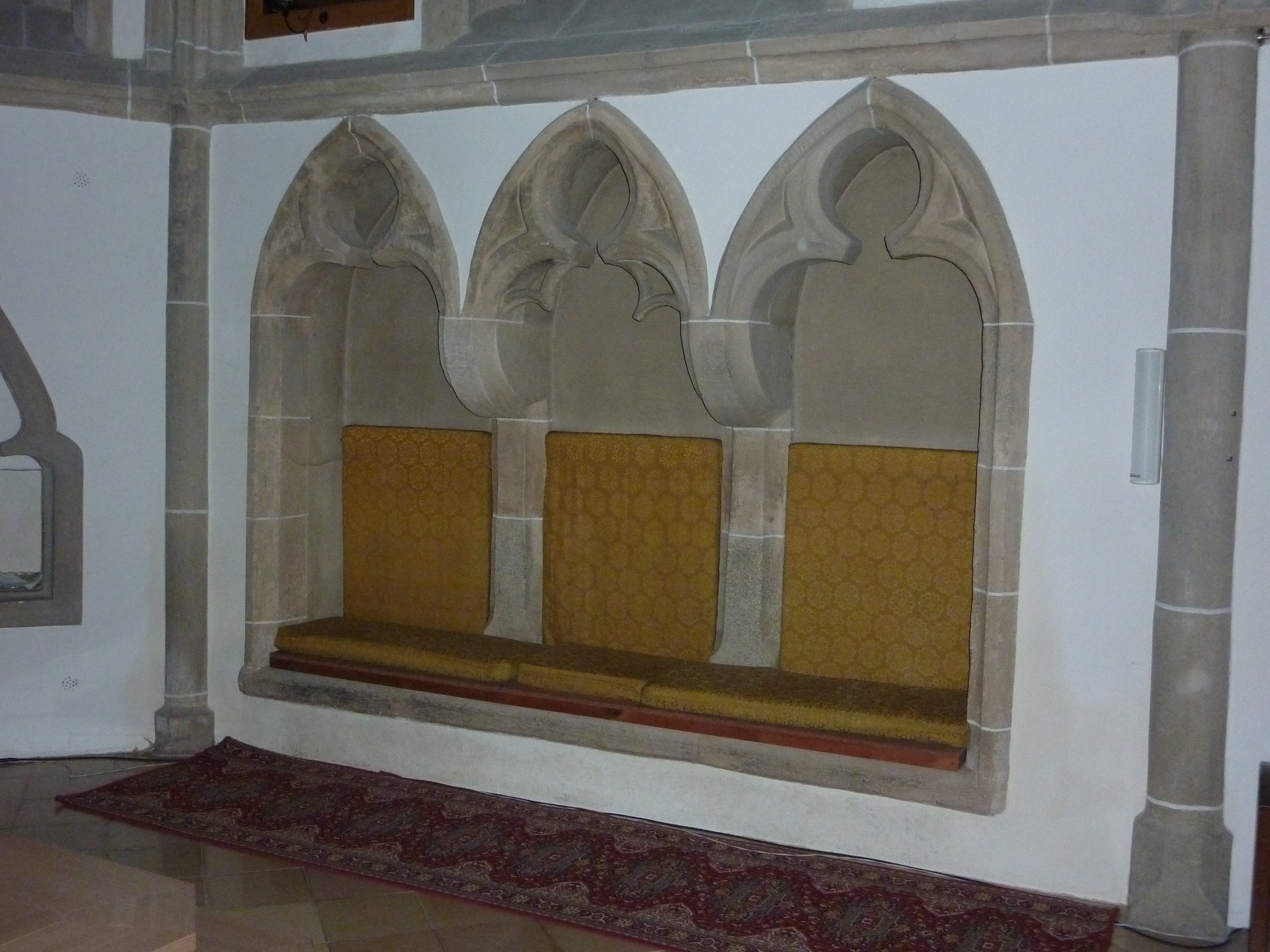 Pfarrkirche hl. Johannes der Täufer, Am Kirchenberg, Gerolding, Dunkelsteinerwald, Niederösterreich - Sessionsnische